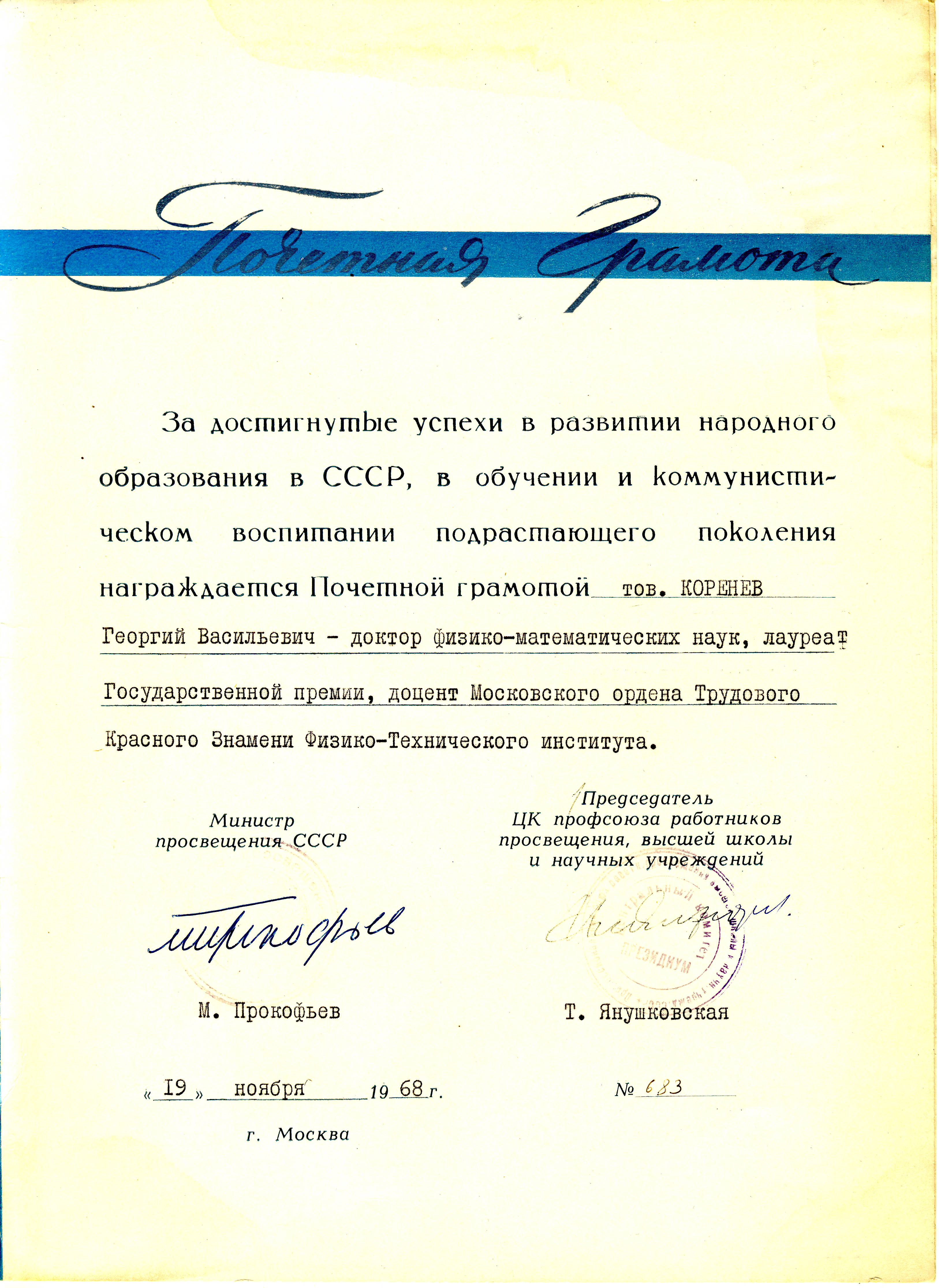 рамота ЦК ВЛКСМ о награждени профессора МФТИ Коренева Георгия Васильевича в знак признания его выдаюшихся заслуг в деле создания данной школы